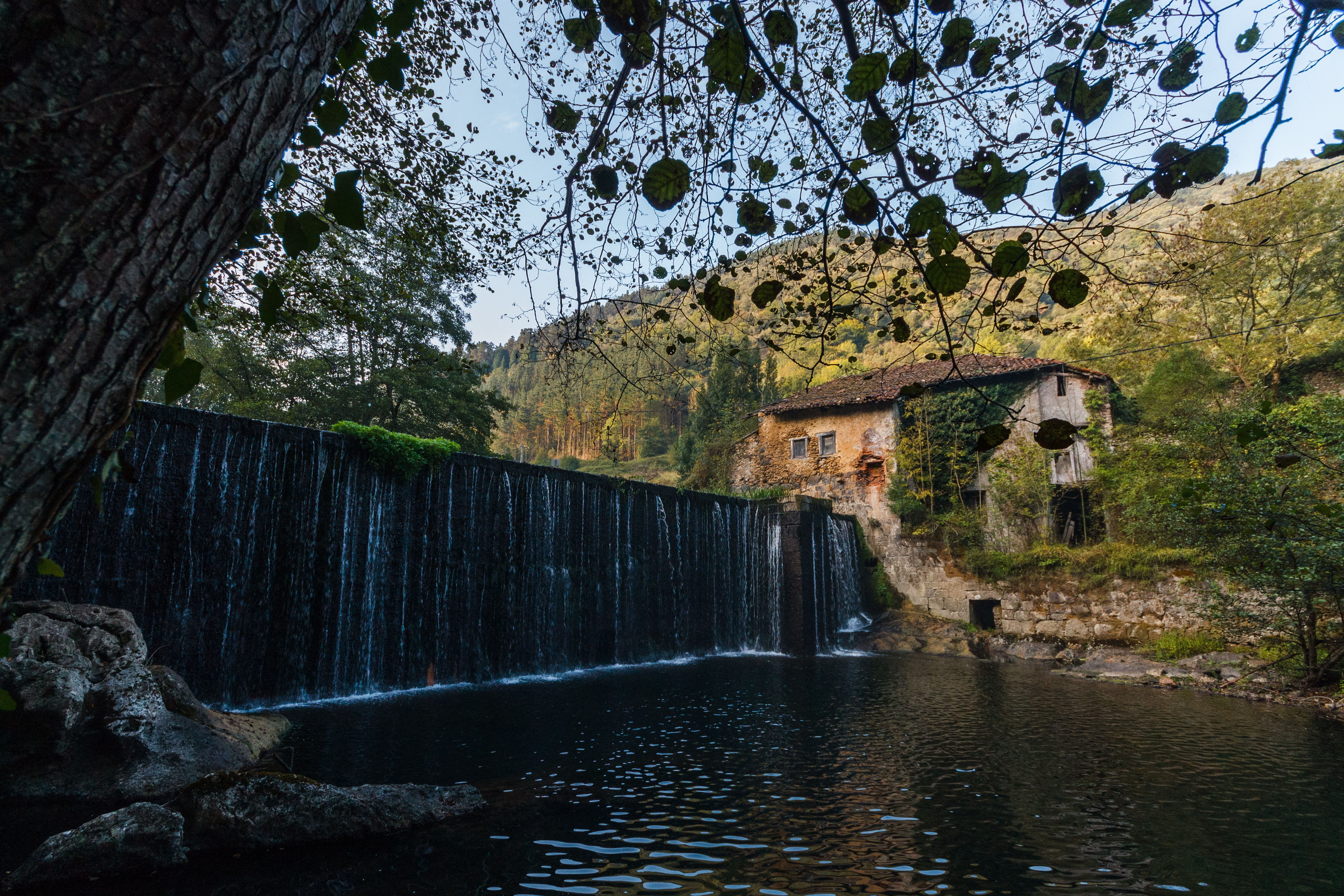 LeaBengolea burdinola